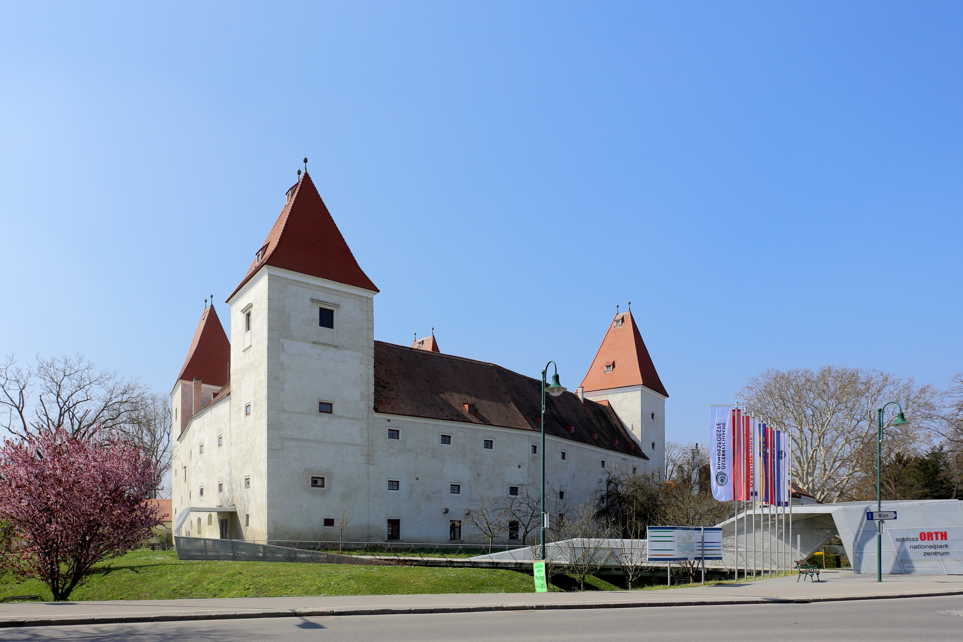 Das Schloss Orth in der niederösterreichischen Marktgemeinde Orth an der Donau, das als Besucherzentrum des Nationalparkes Donau-Auen dient. Eine mächtige dreigeschossige, dreiflügelige Anlage mit vier dominierenden Ecktürmen. Der Westtrakt stammt aus dem 12. Jahrhundert. Nach schweren Schäden durch den Ersten Österreichischen Türkenkrieg 1529 wurde die Anlage unter Beibehaltung des Grundrisses und des vorhandenen Anlagetypus 1550 wieder aufgebaut. Um 1680 erfolgte unmittelbar westseitig der Zubau des sogenannten Neuschlosses.